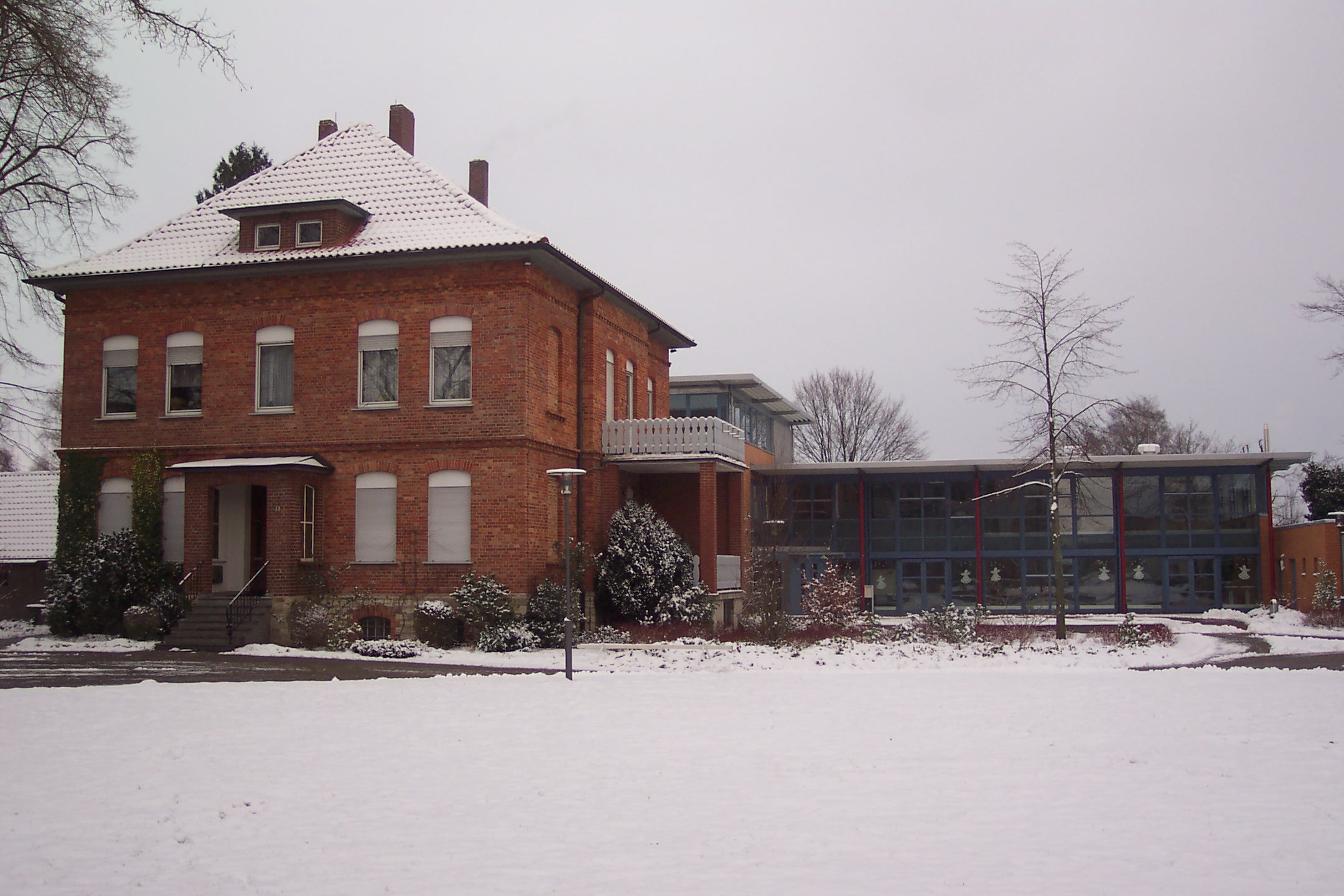 Elsen, Paderborn, Deutschland: Dionysiushaus.